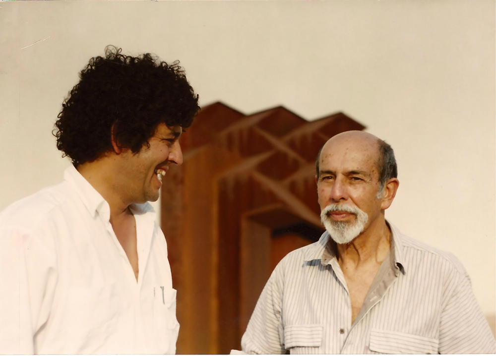 Herminio Barrera y Eduardo Ramírez Villamizar, Museo de Arte Moderno de Bucaramanga, Foto de Nicolás Zea Posada